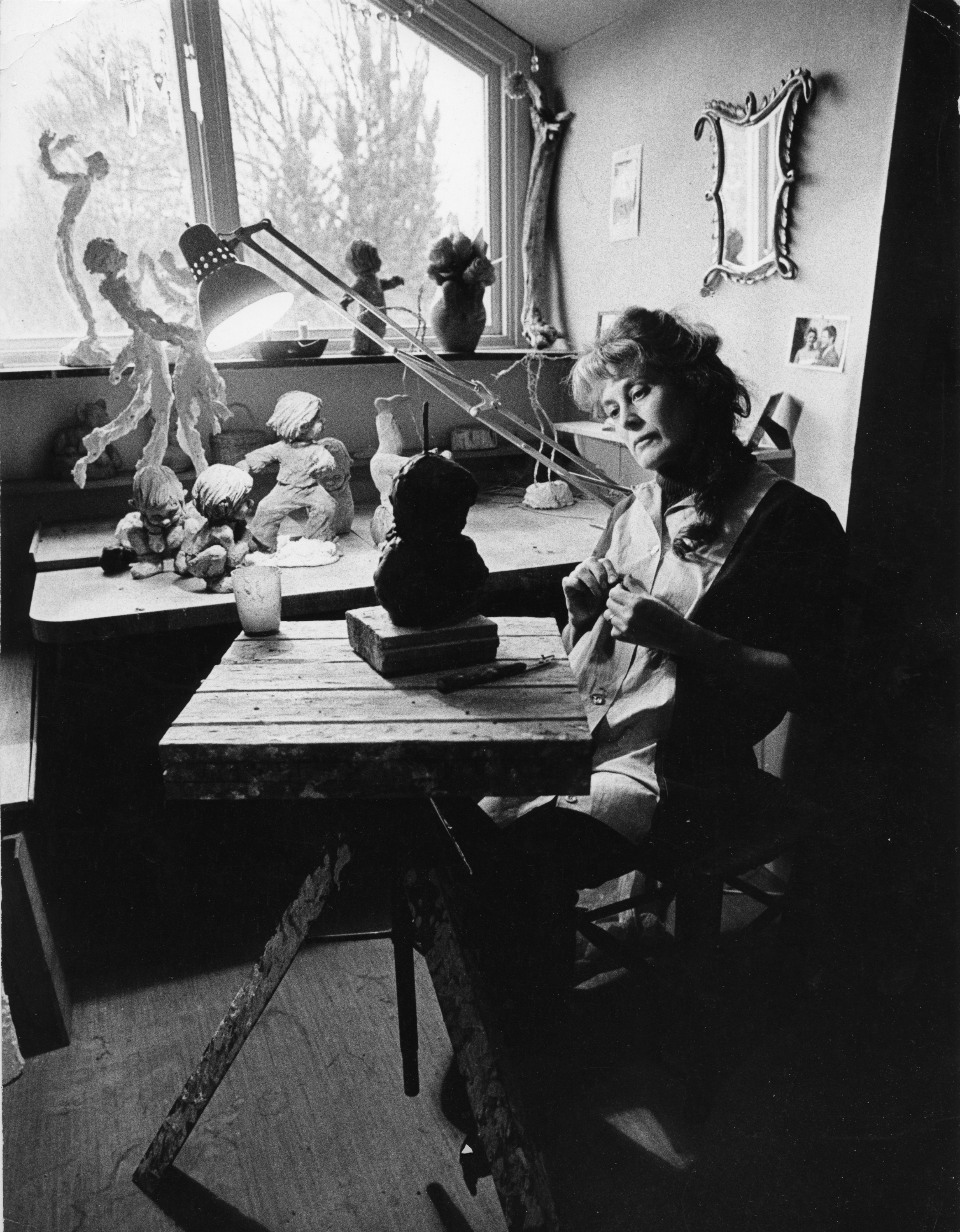 Gun i sin verkstadsateljé på Orrebacksgatan 30, Göteborg, 1970.